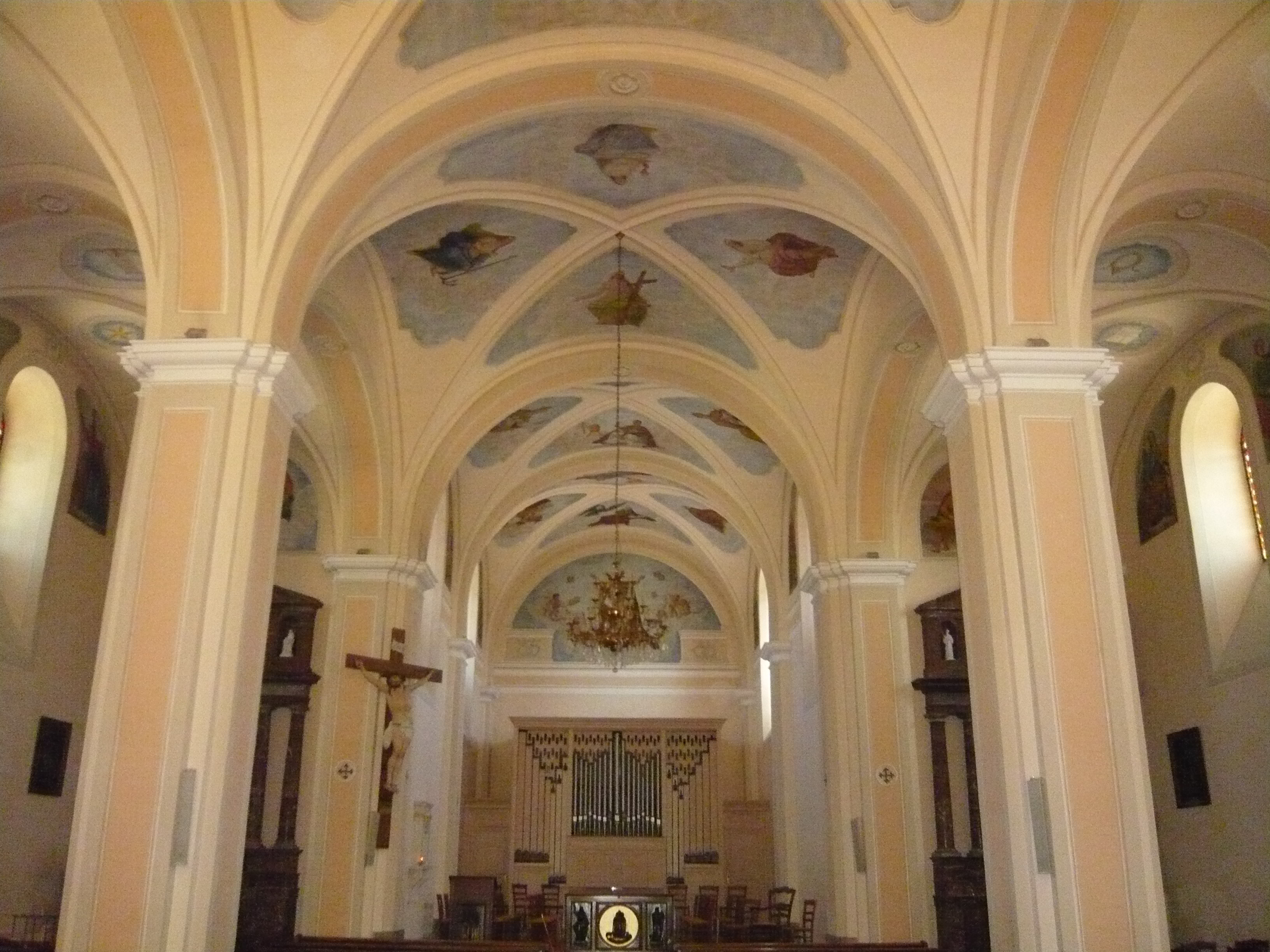 intérieur (église Saint-François-de-Sales d'Habère-Poche)